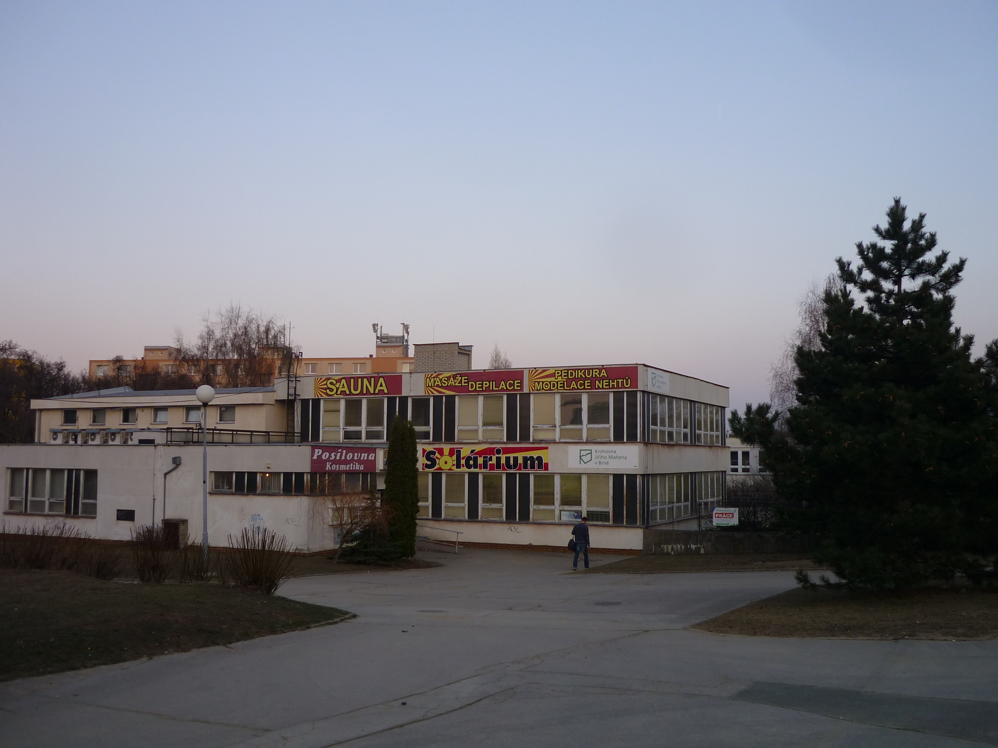 Konstruaĵo de Centro de libera tempo en Brno - Kohoutovice ĉe haltejo Jírovcova